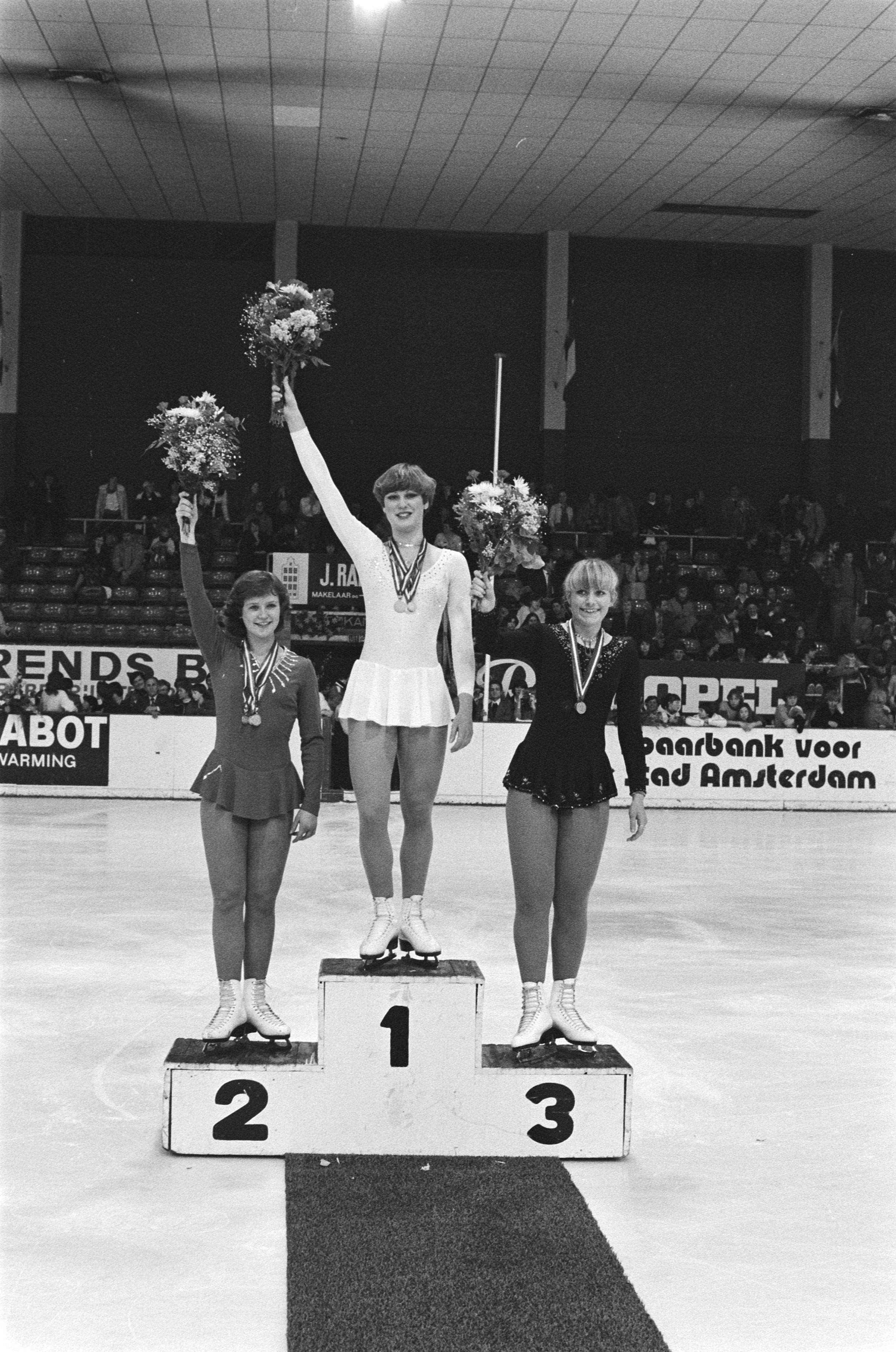 Collectie / Archief : Fotocollectie Anefo Reportage / Serie : [ onbekend ] Beschrijving : Nederlandse kampioenschappen kunstrijden op de schaats; dames tijdens huldiging. Vlnr. Rudina Pasveer, Astrid Jansen in de Wal, Herma van der Horst Datum : 13 januari 1979 Trefwoorden : huldigingen, kunstrijden, schaatsen, sport Persoonsnaam : Horst, Herma van der, Jansen in de Wal, Astrid, Pasveer, Rudina Fotograaf : Dijk, Hans van / Anefo Auteursrechthebbende : Nationaal Archief Materiaalsoort : Negatief (zwart/wit) Nummer archiefinventaris : bekijk toegang 2.24.01.05 Bestanddeelnummer : 930-0750